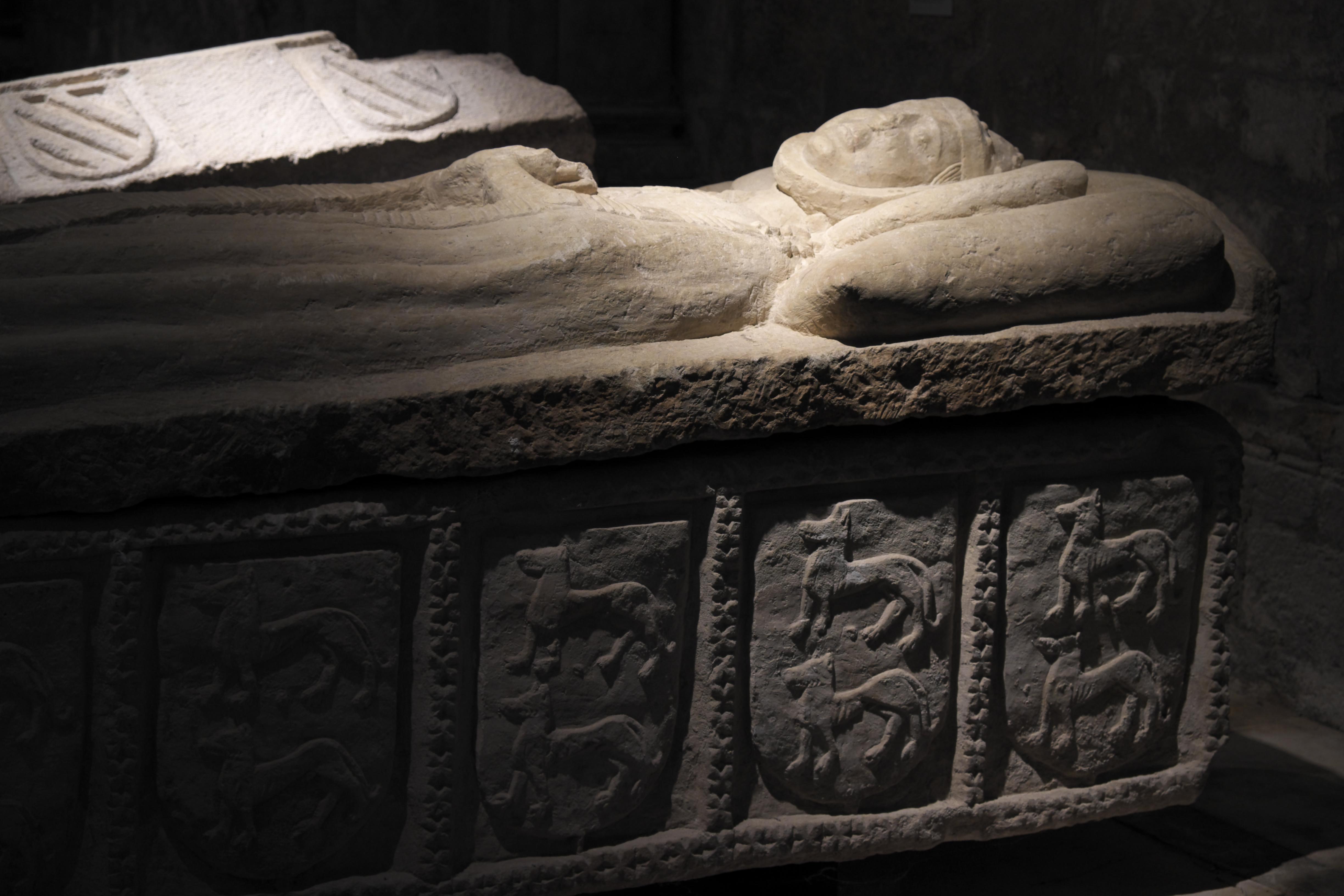 Grab einer adeligen Dame in der Kirche des ehemaligen Prämonstratenserklosters Santa María la Real in Aguilar de Campoo in der Provinz Palencia (Kastilien-León/Spanien), aus Kalkstein, um 1300, mit Liegefigur, an der Seite Wappenschilder mit der Darstellung von Wölfen